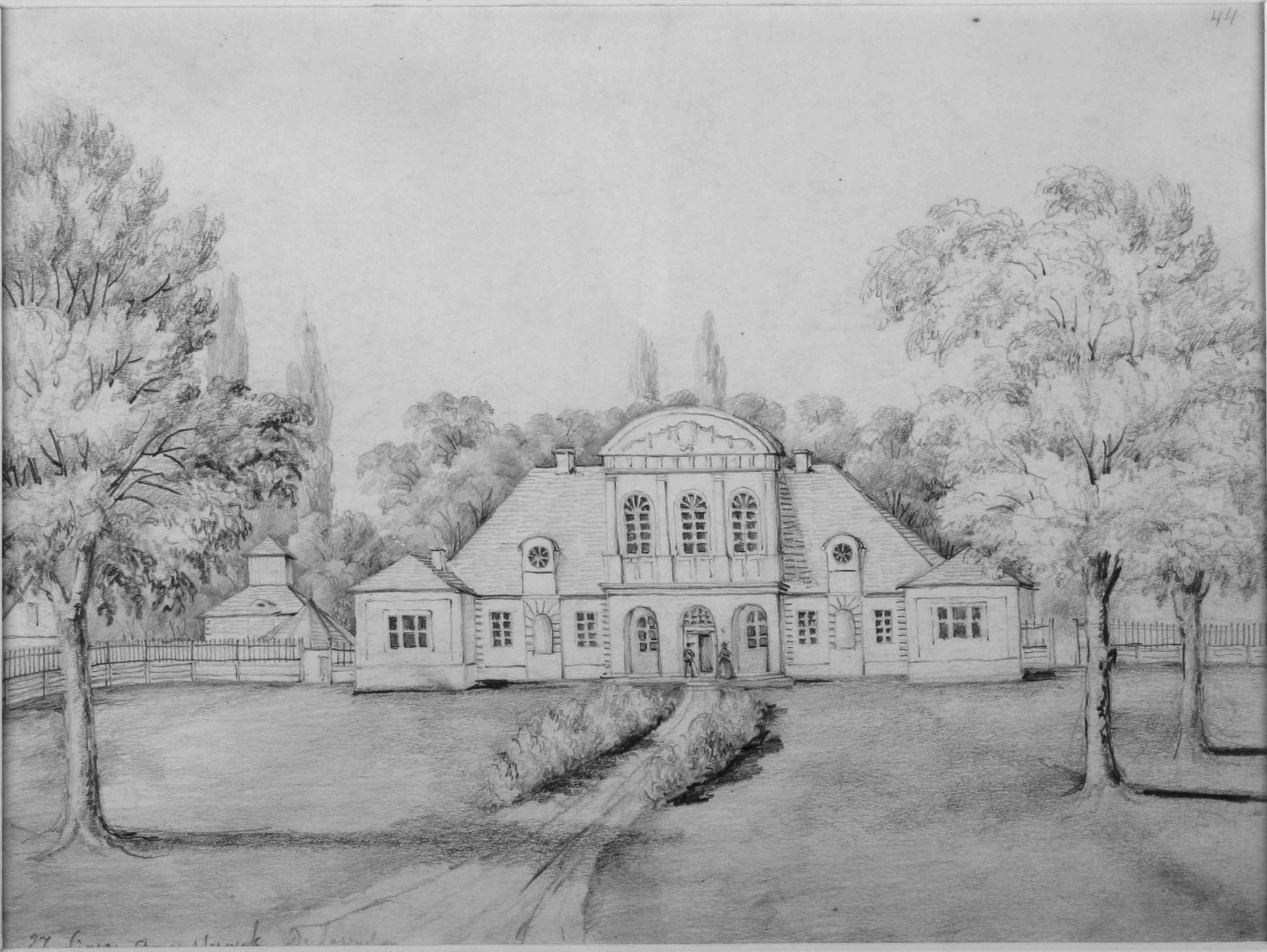 Беларуская (тарашкевіца): Горадня (Horadnia), Аўгустовак (Aŭgustovak)